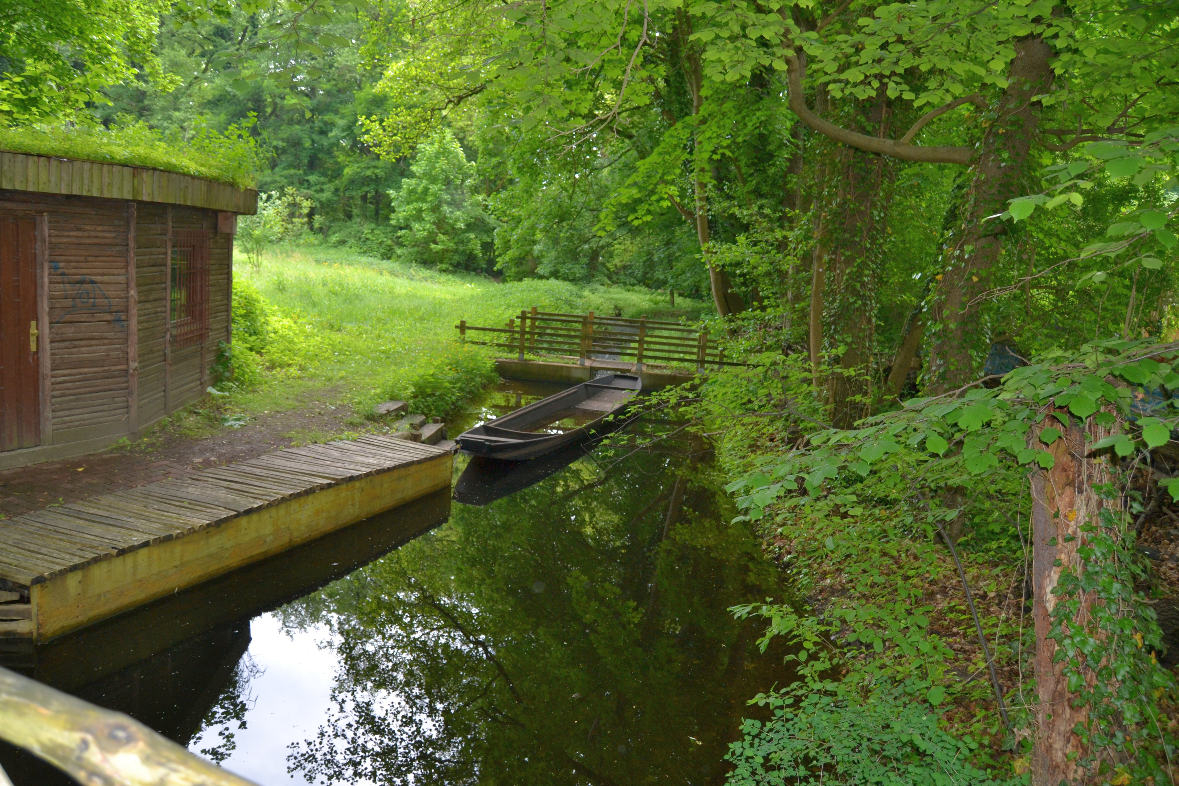 Kleiner Spreewaldpark Schöneiche.